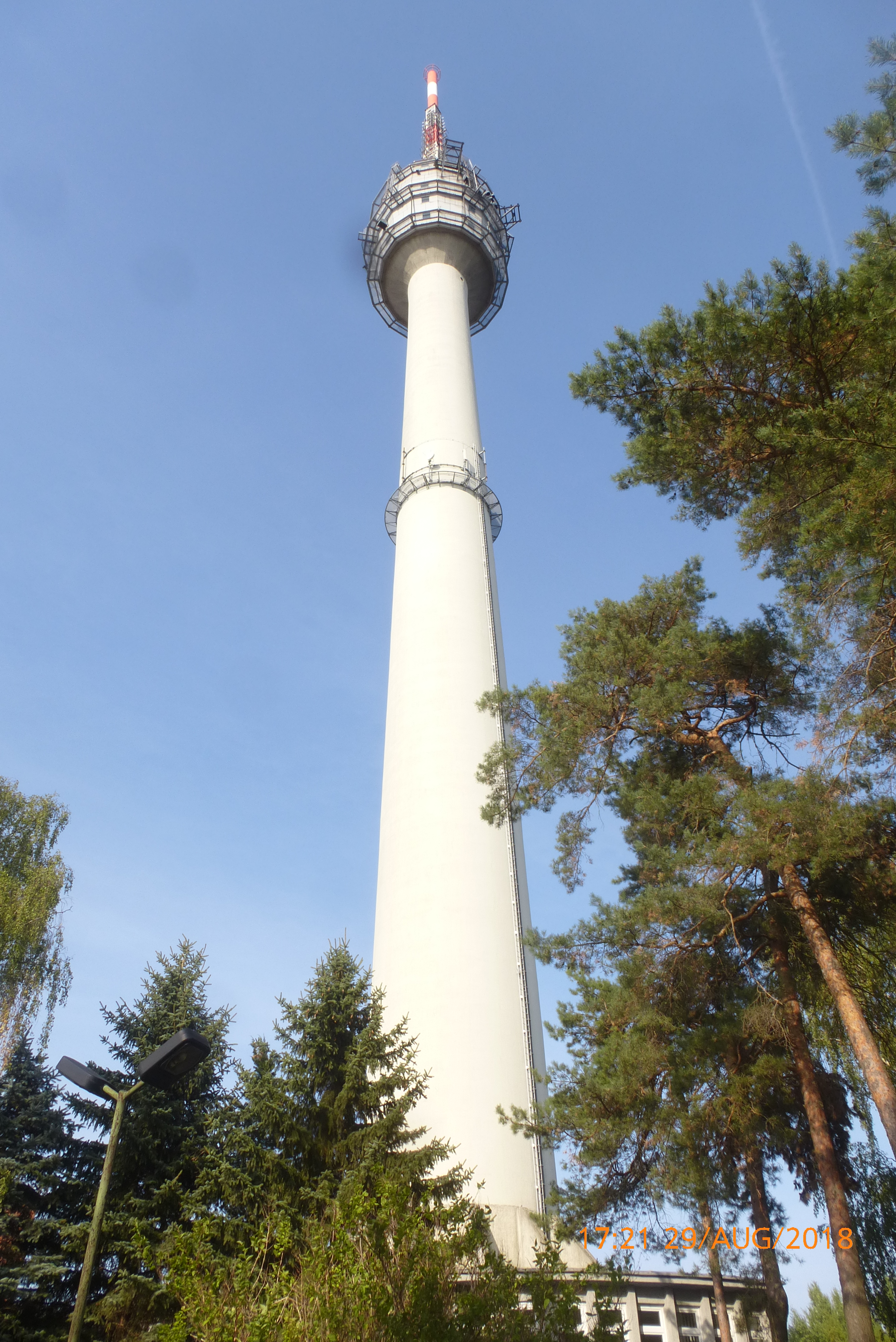 Aufnahme 2018 im Sommer.